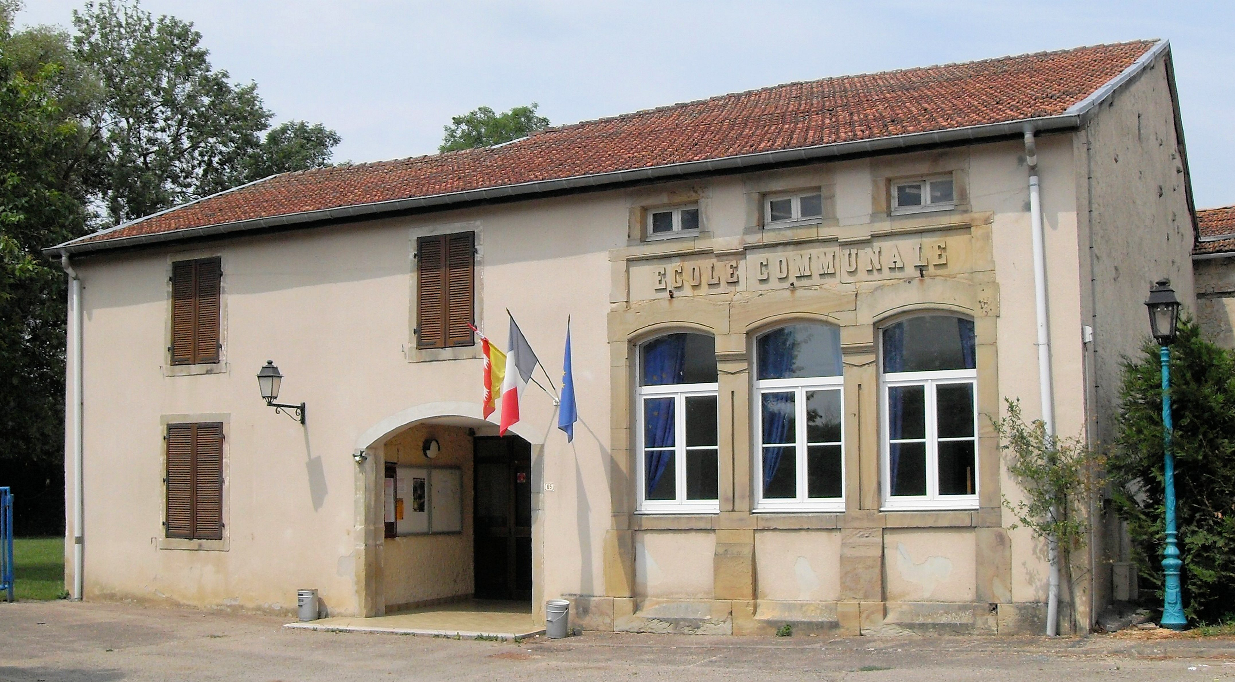 La mairie-école de Frenelle-la-Grande, l'ancienne école communale